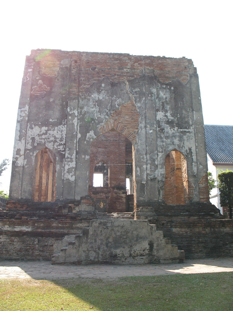 Dusit Sawan Thanya Mahaprasat Hall, King Narai's Palace, Lopburi Province.